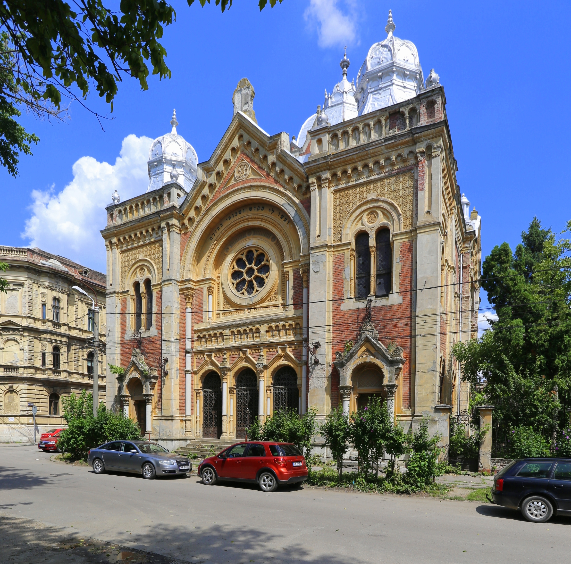 Fabric Synagogue, Timișoara